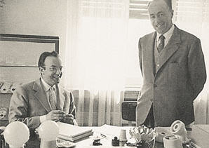 Walter Viaro e Francesco Gusi cofondatori della società Vimar spa.